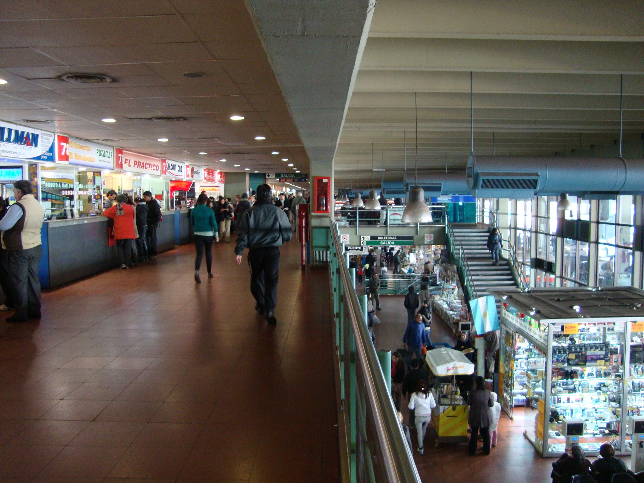 Vista del interior de la Terminal de Ómnibus de Retiro (Buenos Aires), desde el nivel de las boleterías entre el puente 2 y el puente 3.